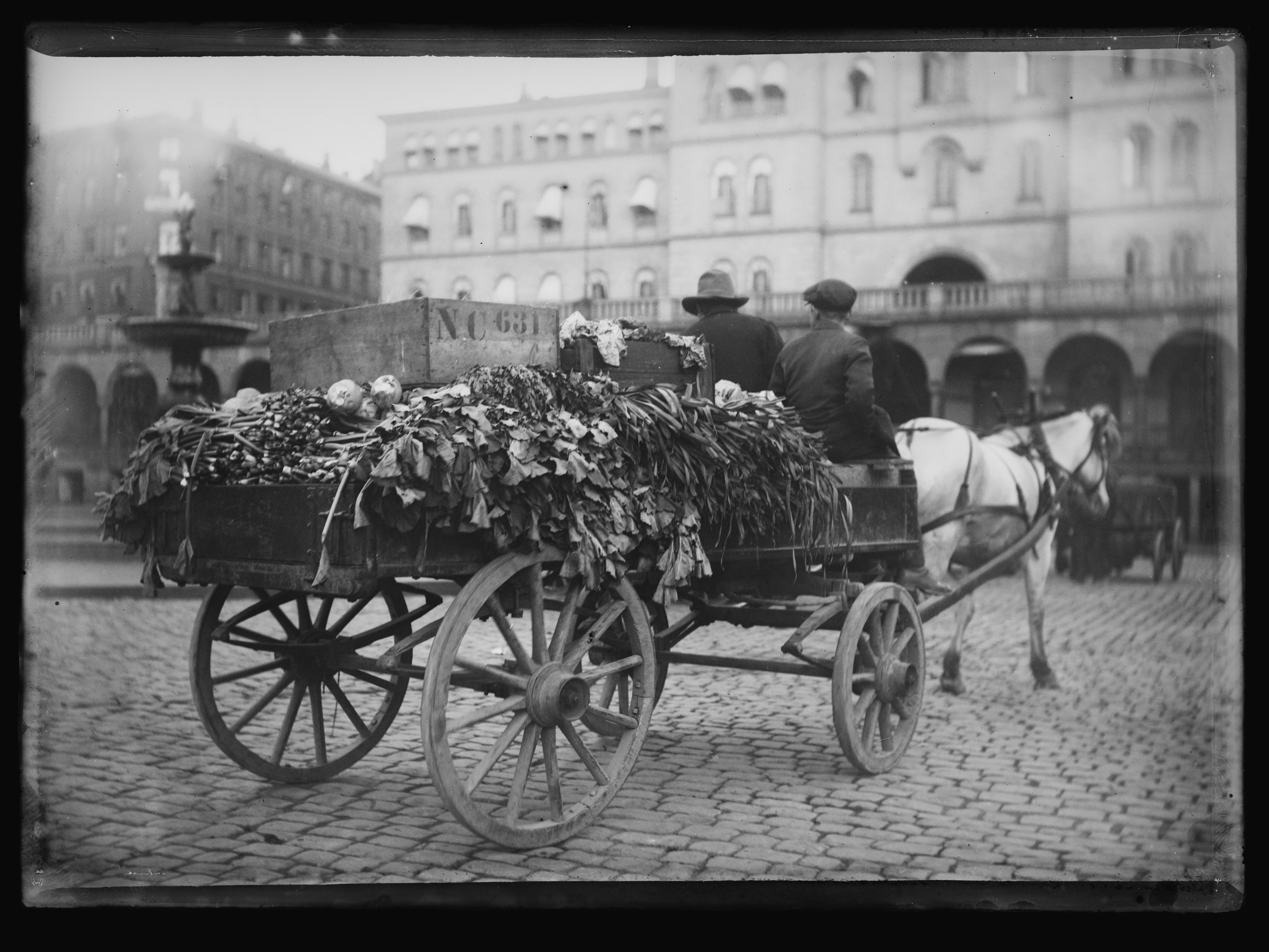 Bildet er hentet fra Nasjonalbibliotekets bildesamling. Anmerkninger til bildet var: Påskrift arkivark: Fra Torvet Arkivnummer: 203 Oslo,Youngstorget, Oslo, Oslo